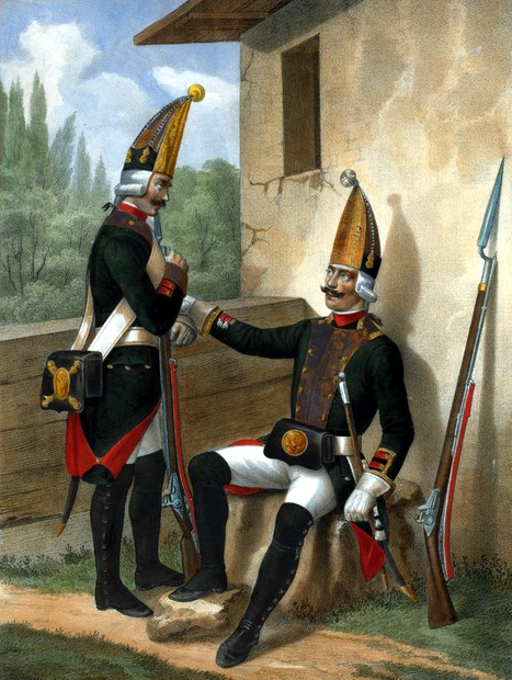 Гренадер и Гренадерский Унтер-Офицер Сибирского Гренадерского полка. 1797-1801.